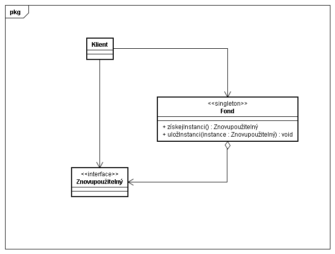 Jednoduchý class diagram k návrhovému vzoru Fond (bazén).